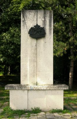 Slavkov - pomník obětem 2. světové války